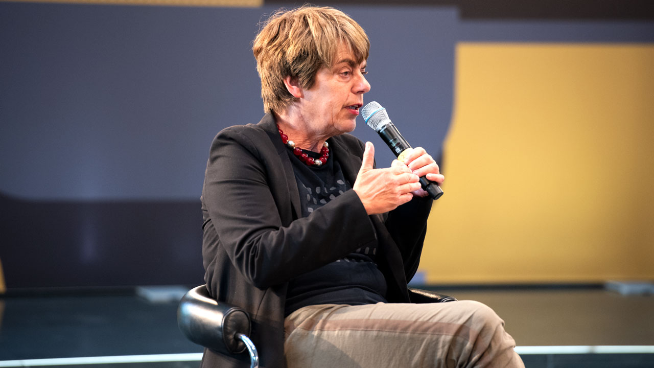 Die Grünen - Under pressure - Kunst und Freiheit: Amelie Deuflhard